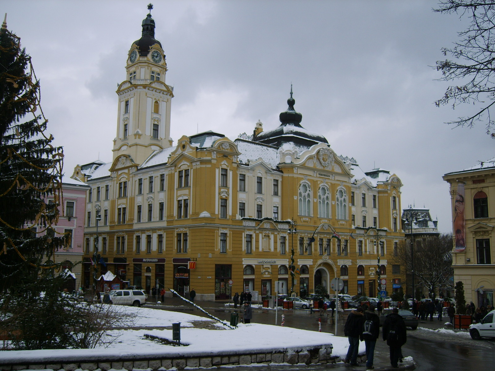 Pécs, Town Hall, Hungary / Pécs városháza, Magyarország